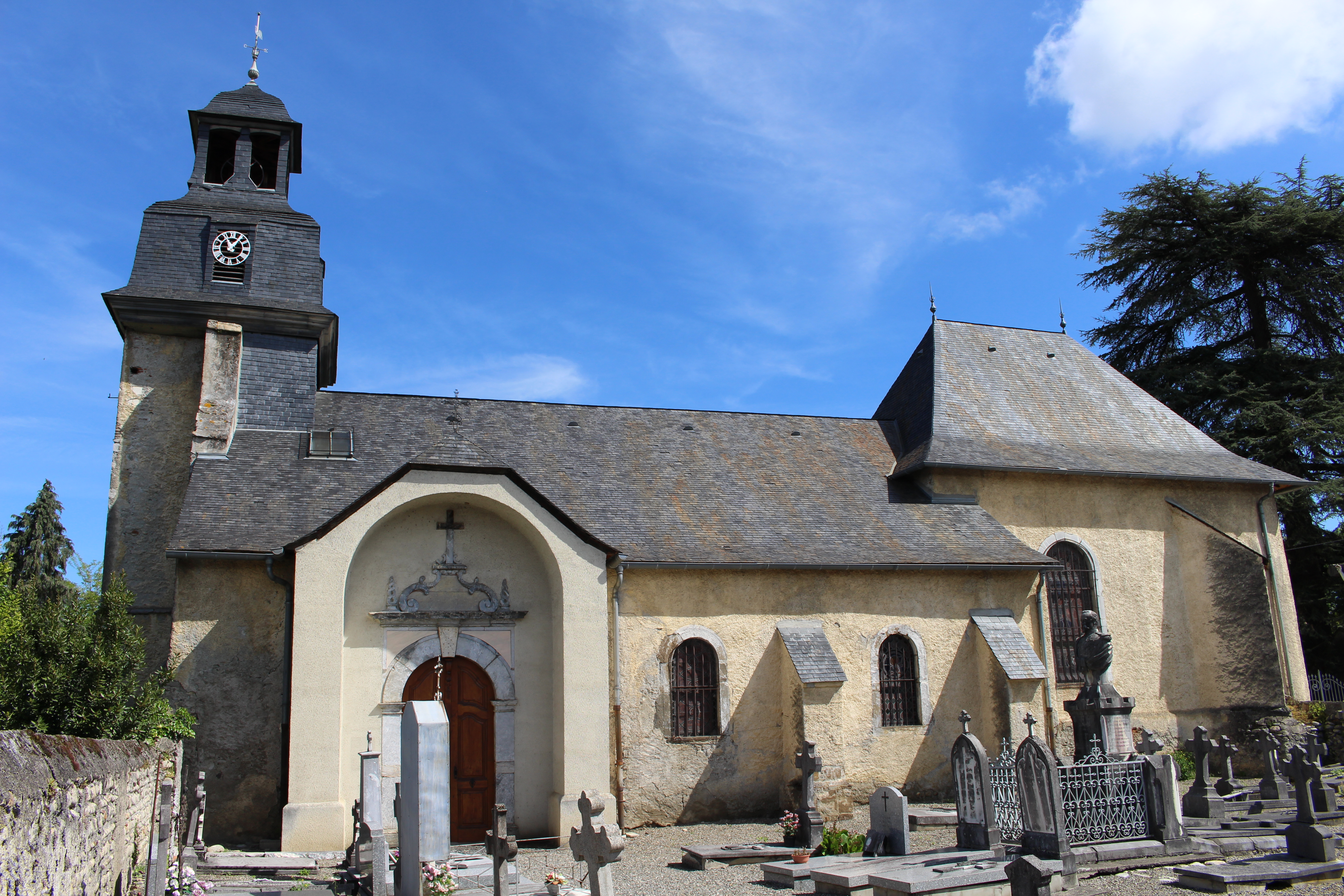 Église Saint-Barthélemy de Salles-Adour (Hautes-Pyrénées)